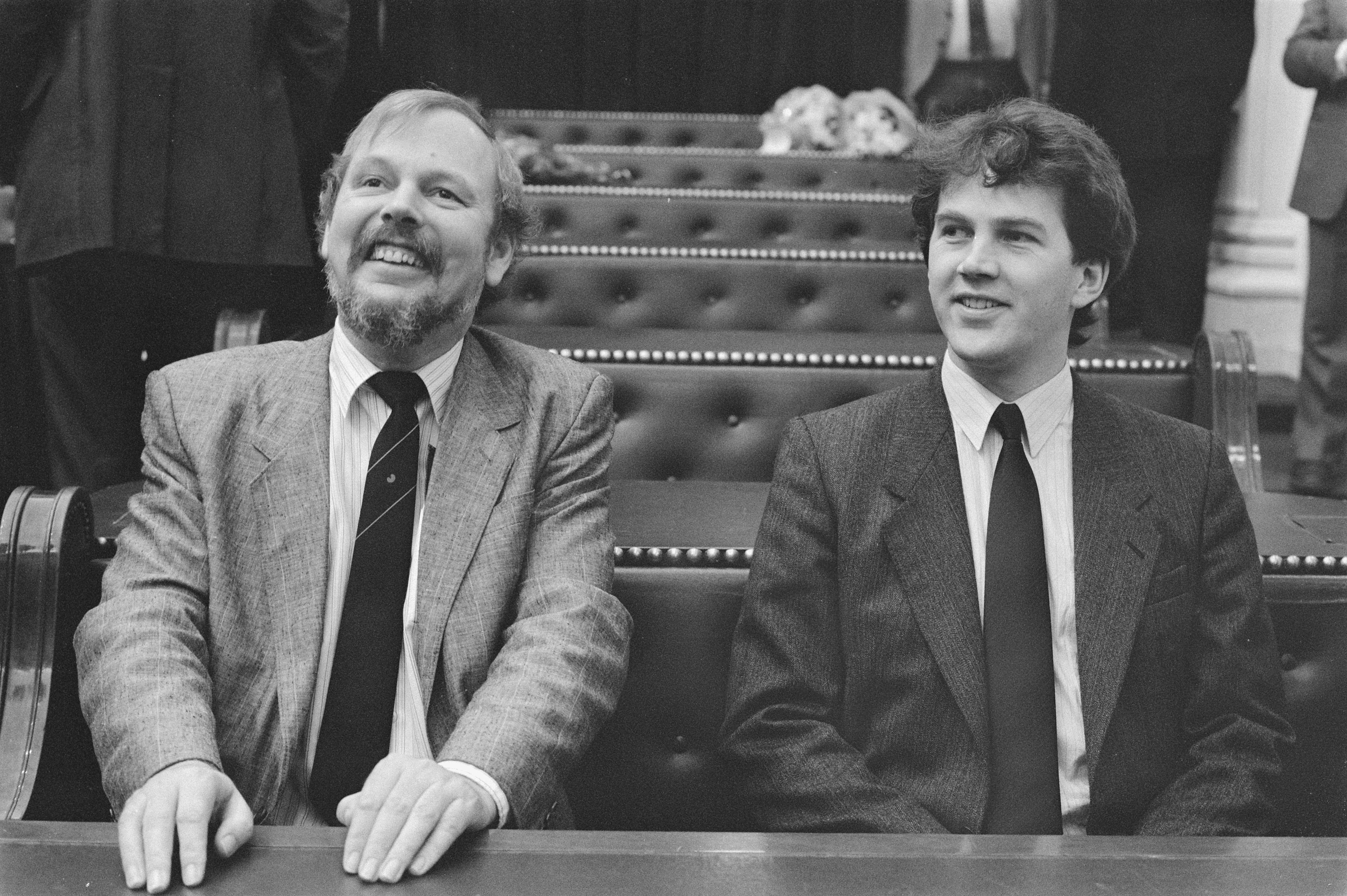 Collectie / Archief : Fotocollectie Anefo Reportage / Serie : [ onbekend ] Beschrijving : Installatie nieuwe PvdA-Kamerleden; Joop van den Berg en Jaap Jelle Feenstra ; Van den Berg en Feenstra Datum : 21 januari 1988 Trefwoorden : Kamerleden, installaties, politiek Persoonsnaam : Jaap Jelle Feenstra, Joop van den Berg Fotograaf : Fotograaf Onbekend / Anefo Auteursrechthebbende : Nationaal Archief Materiaalsoort : Negatief (zwart/wit) Nummer archiefinventaris : bekijk toegang 2.24.01.05 Bestanddeelnummer : 934-1736